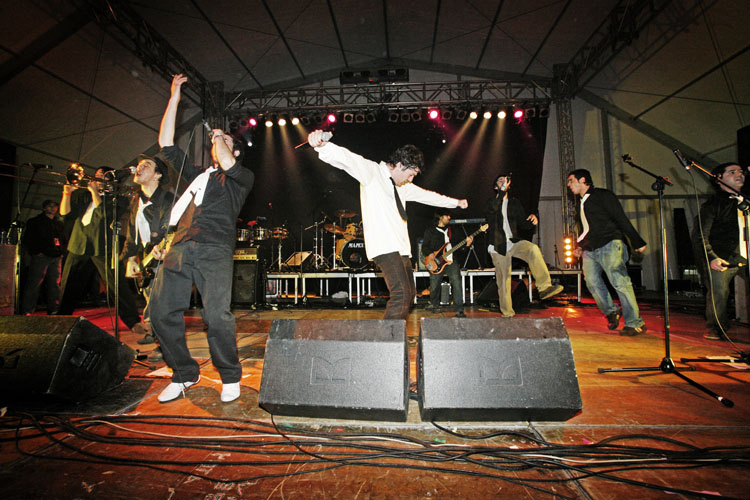 La Gossa Sorda durant el Festivern 2007